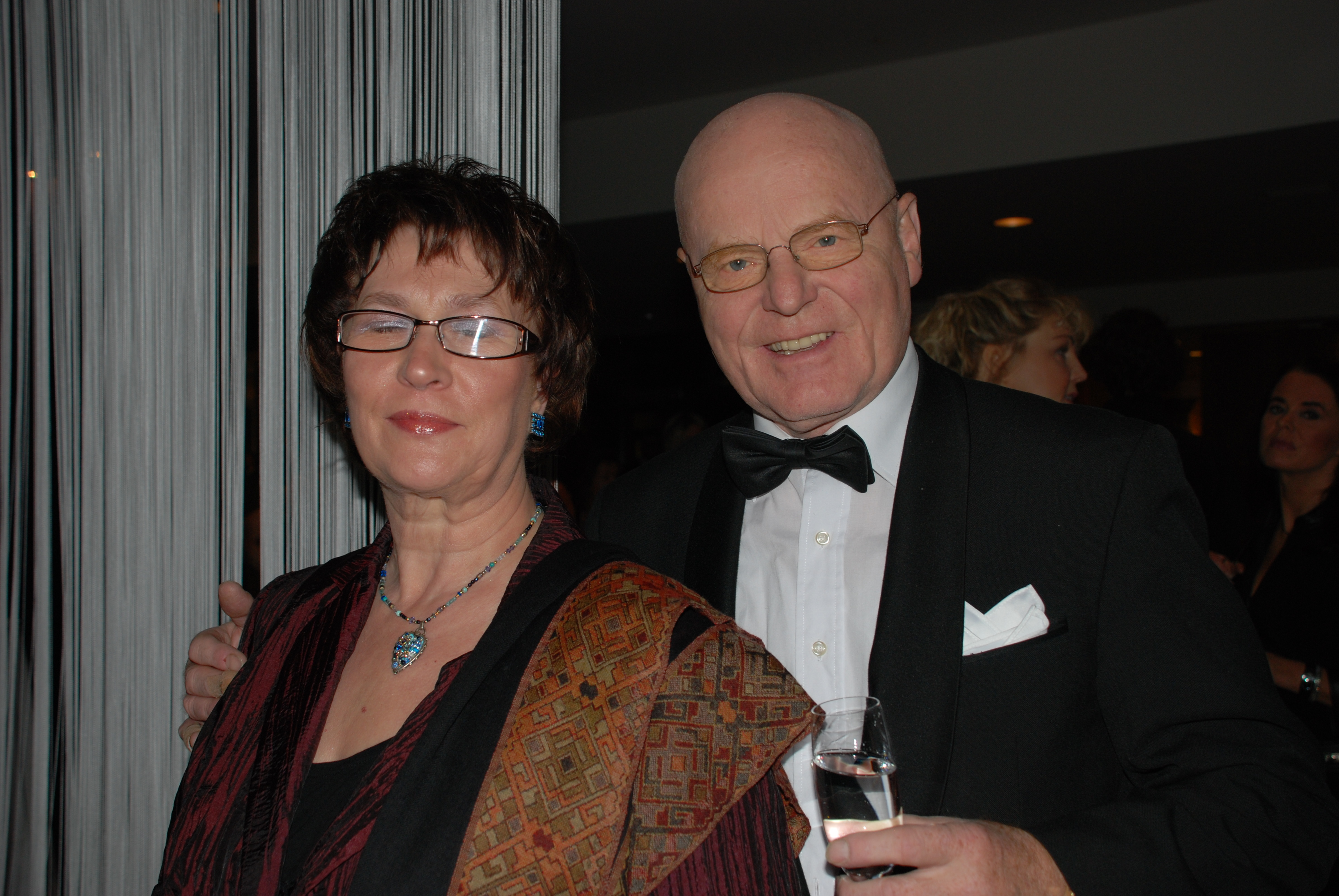 Ómar Ragnarsson á Edduverðlaununum árið 2007